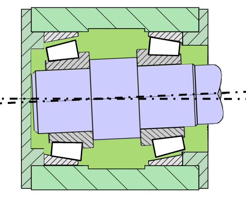 Beispiel einer angestelten Stützlagerung in X-Konfiguration.